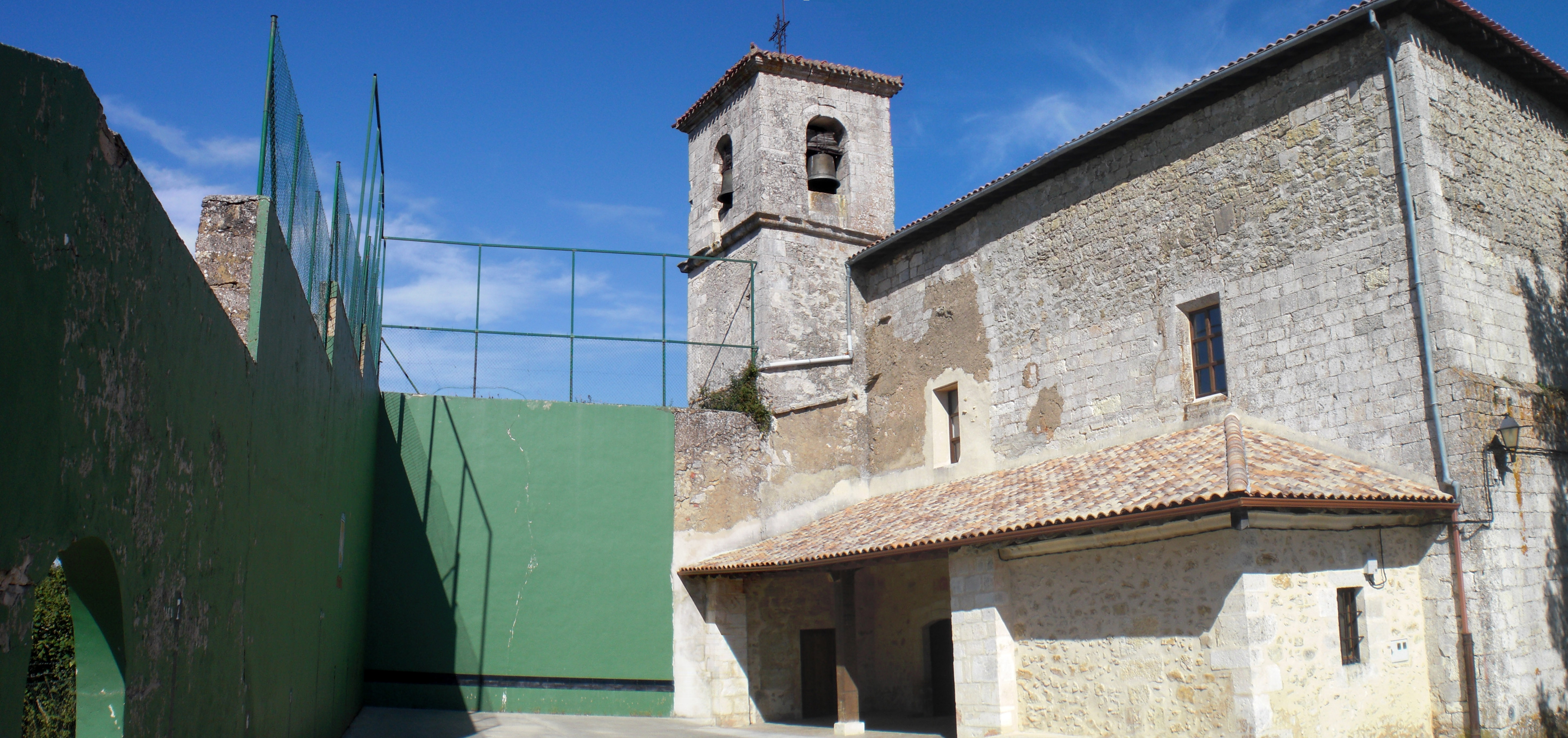 Erroitegiko eliza eta frontoia